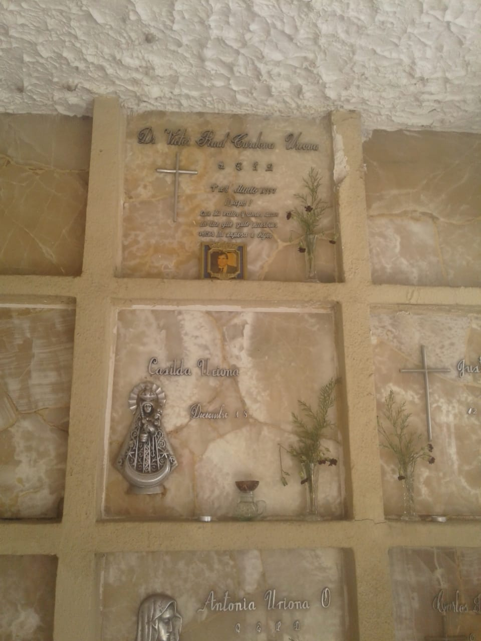 dentro del mausoleo